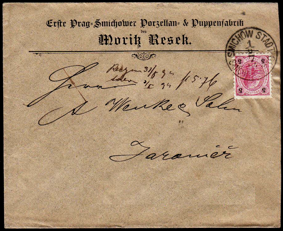 1894 gestempelter Briefumschlag, Adressseite mit Vordruck des Absenders „Erste Prag-Smichower Porzellan- und Puppenfabrik des Moritz Resek“ ...